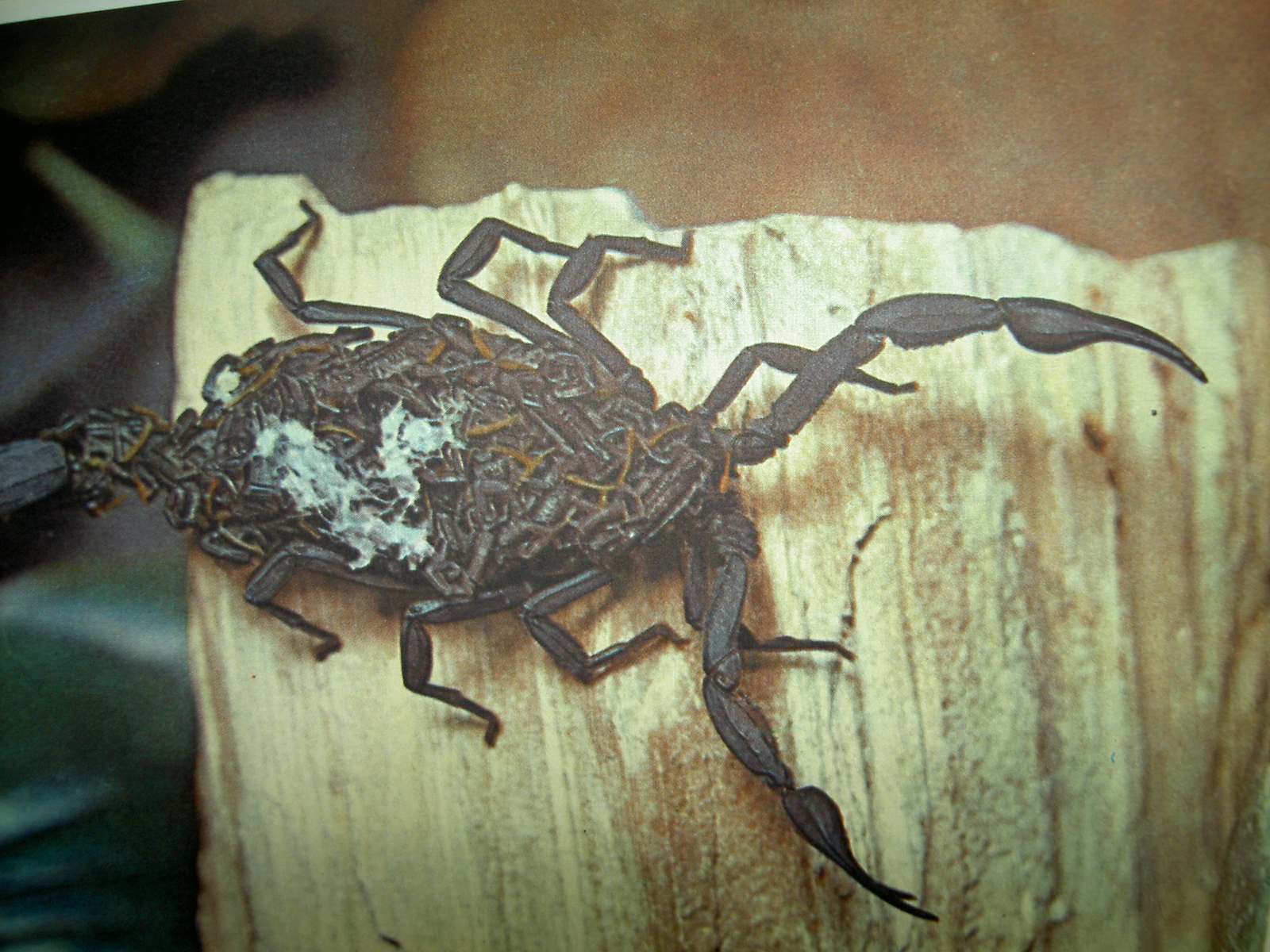 Snímek_232.jpg štír Centruroides gracilis